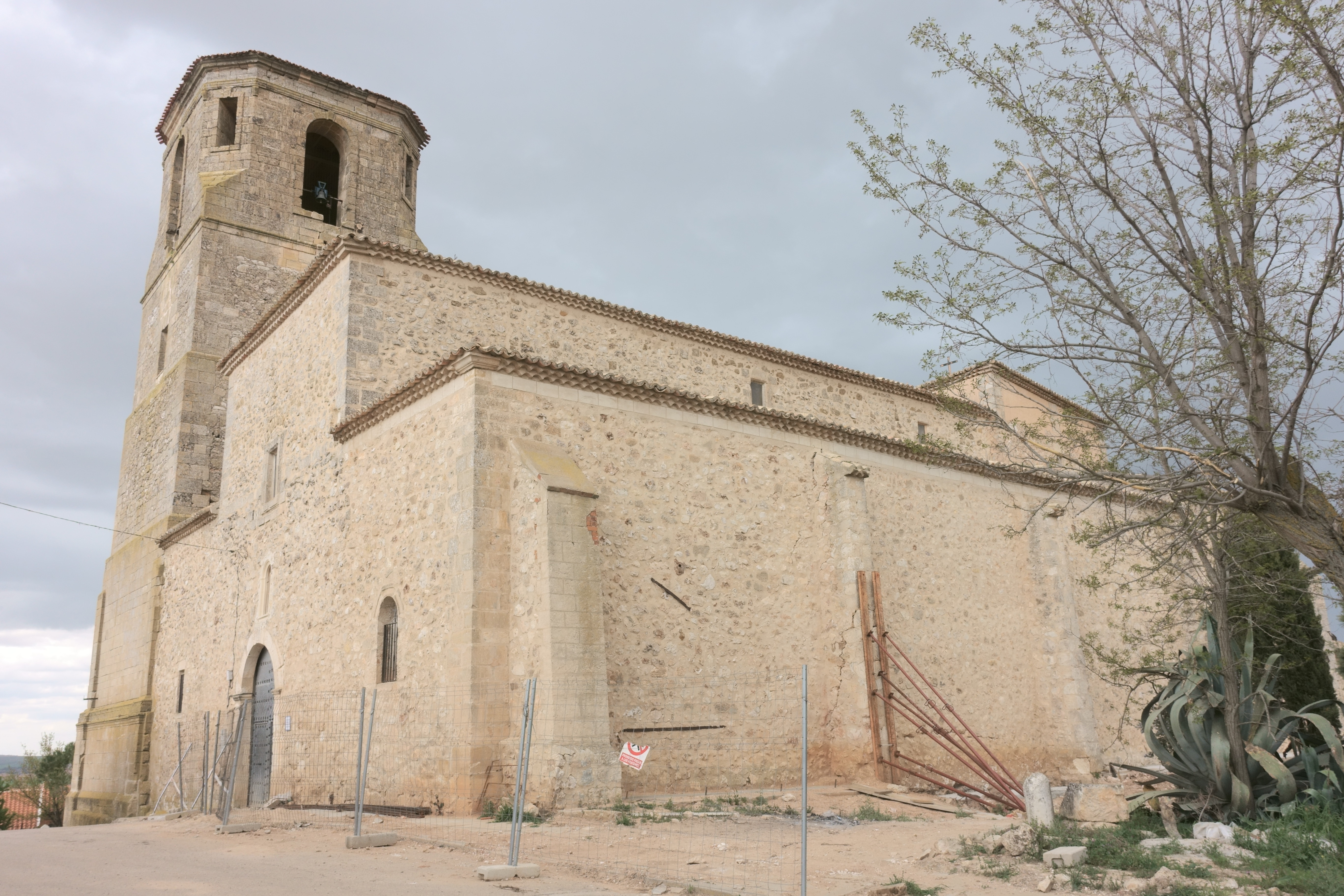 Iglesia de Nuestra Señora de la Asunción, en Montalbanejo (Cuenca, España).